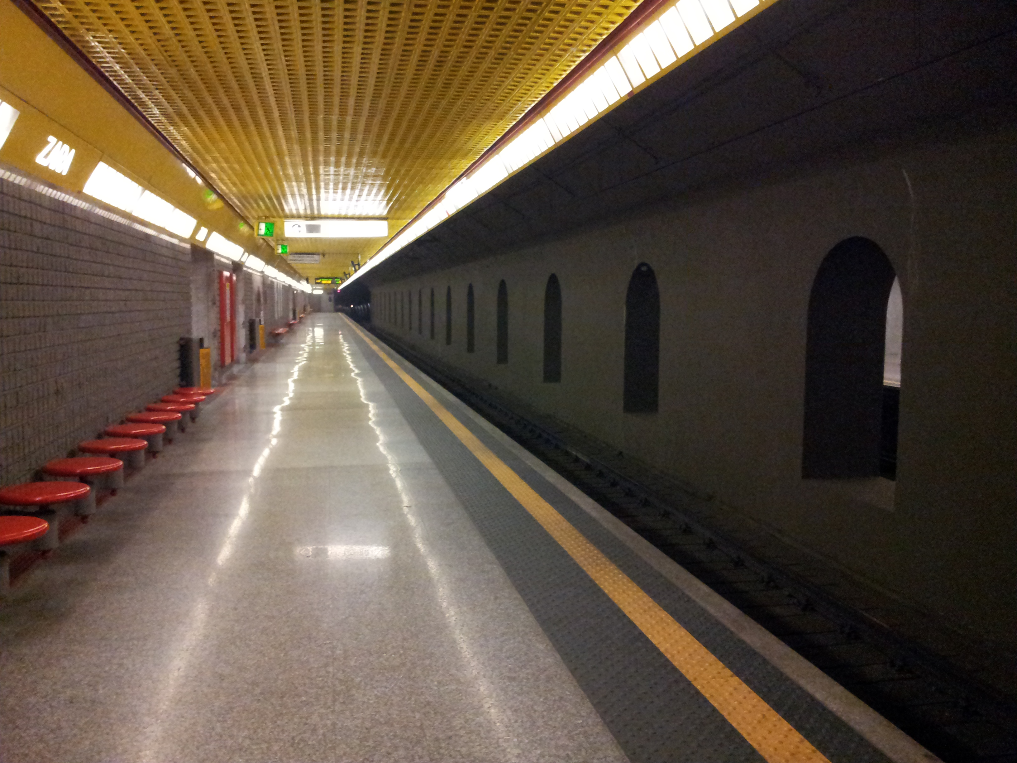 Metropolitana di Milano - Banchina stazione Zara M3